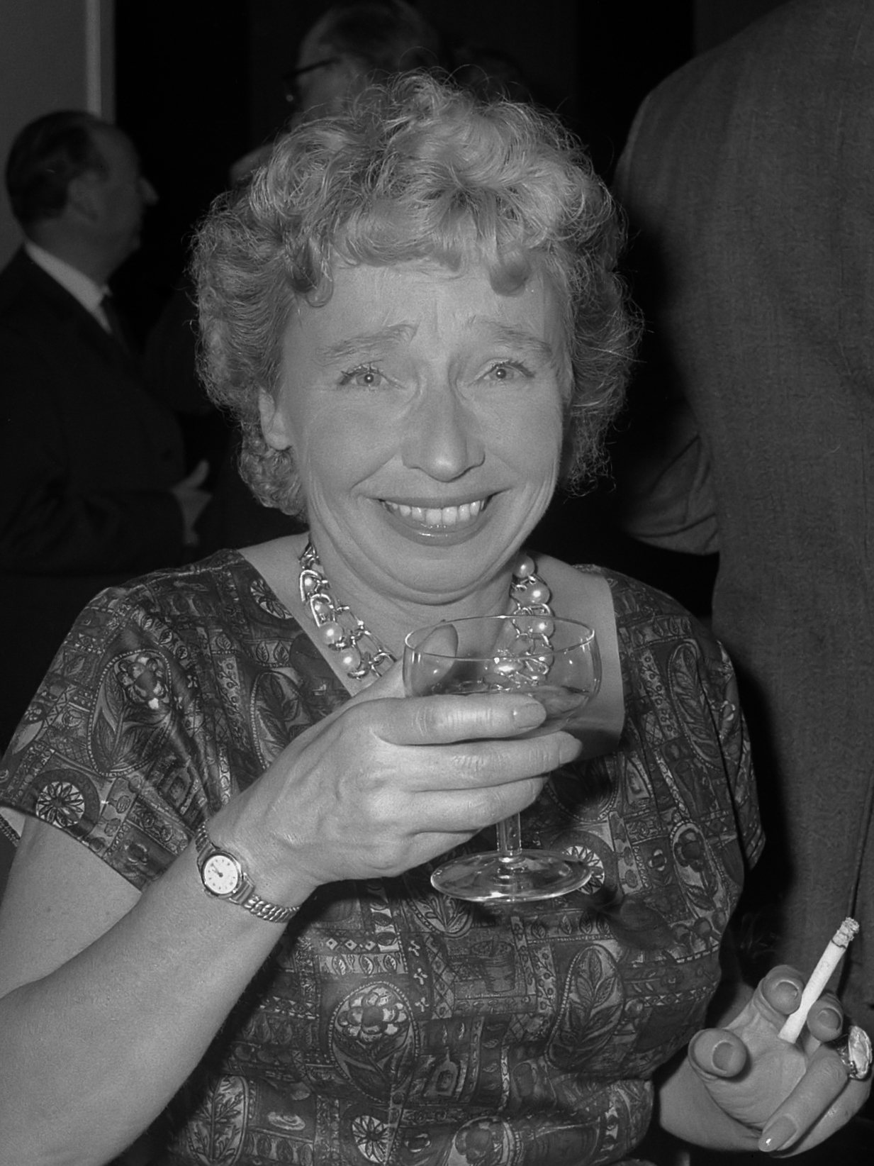 Reunie Carltonhotel der lichte muziek. Wiesje Bouwmeester 30 september 1963